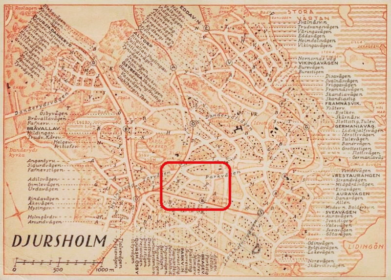 Karta över Djursholm med kvarteret "Yggdrasil" i röd ram